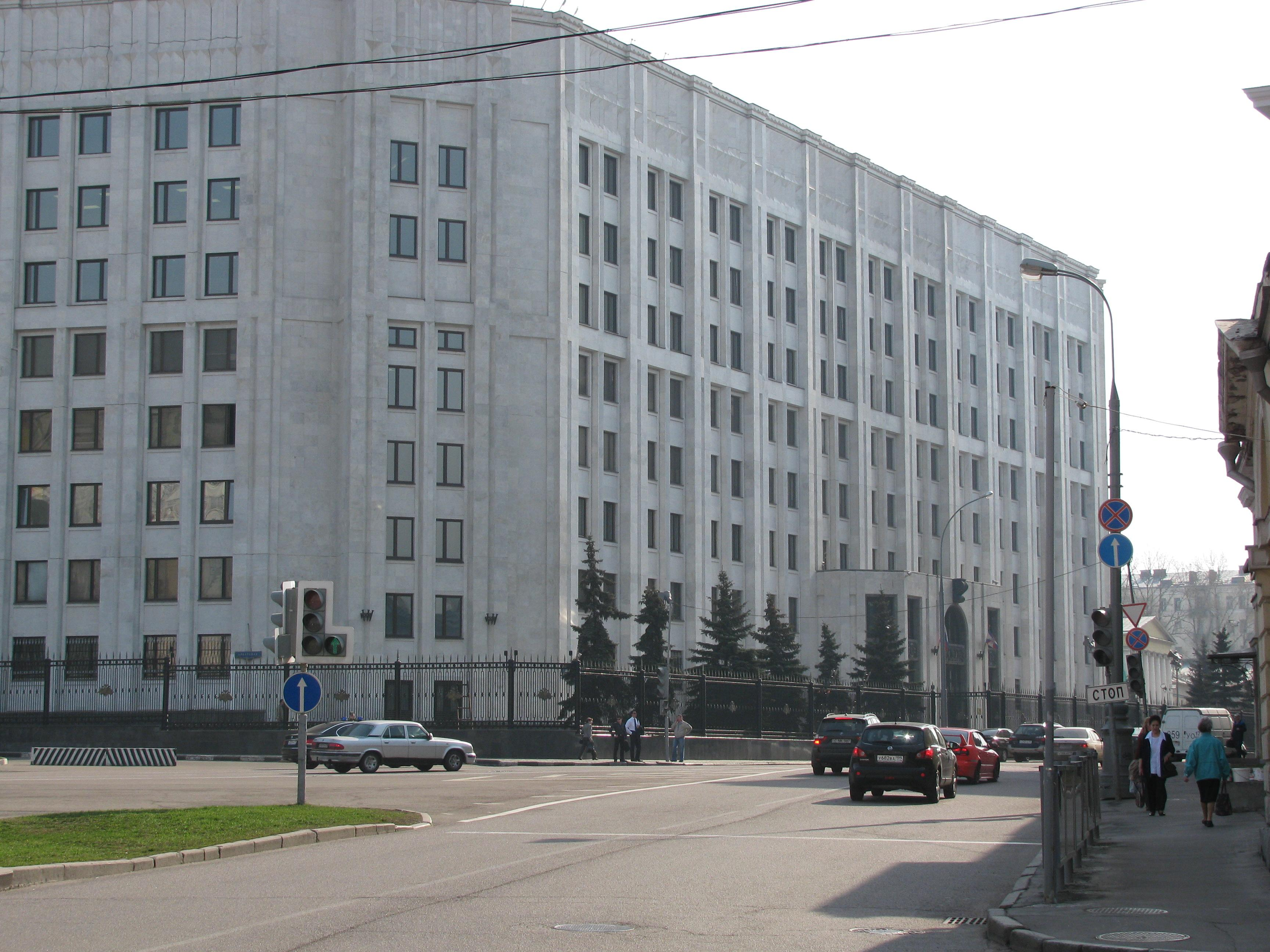 Новое здание МОРФ (70-е гг.)